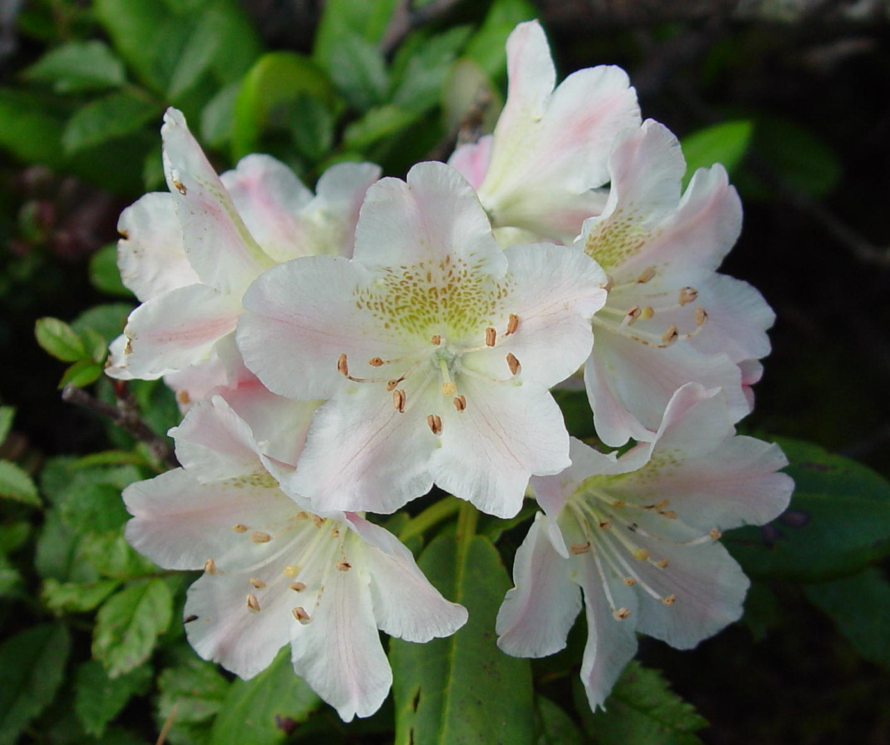 ハクサンシャクナゲ 蝶ヶ岳にて